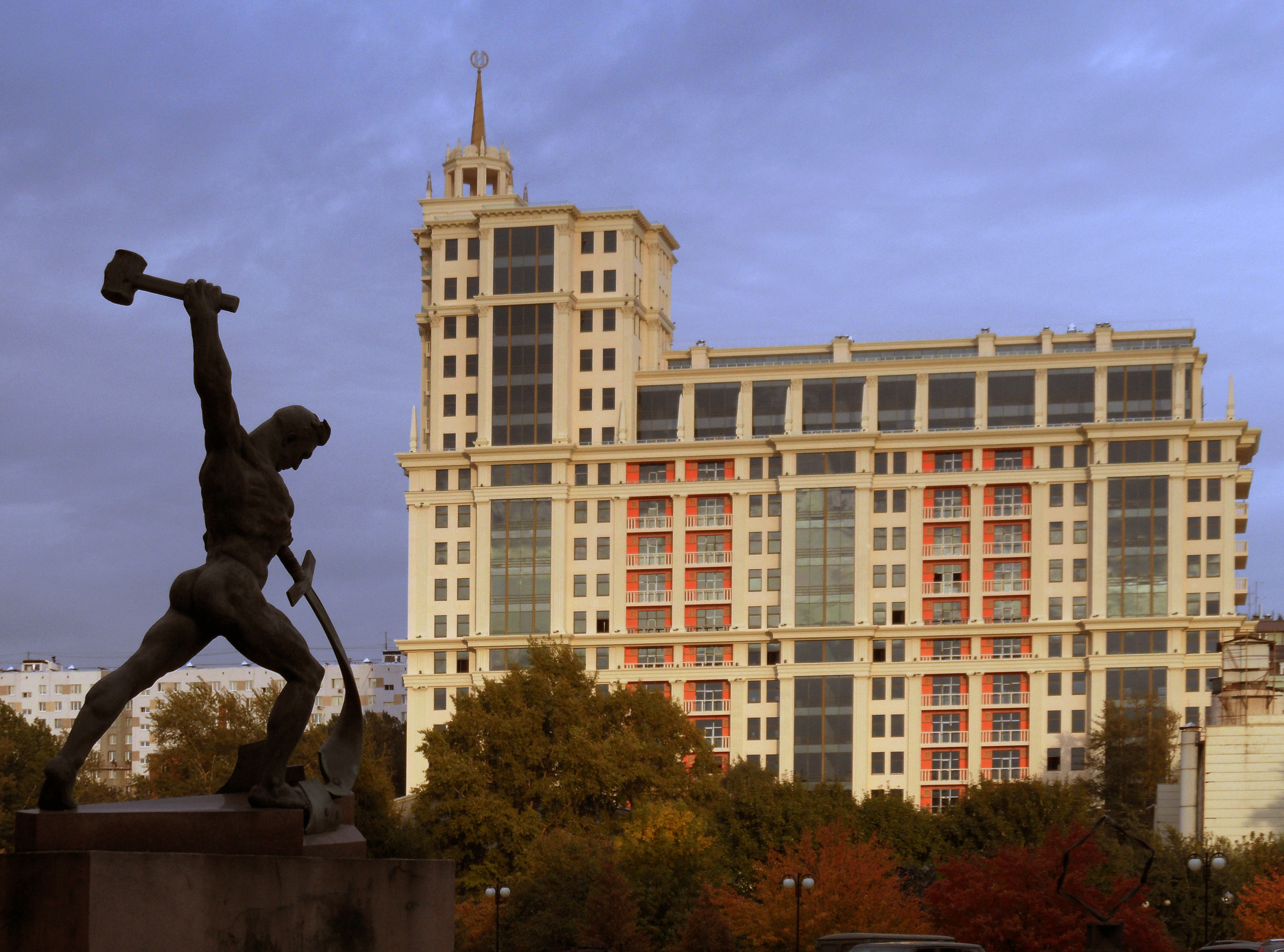 Имперский дом, был снят мою со стороны ЦДХ